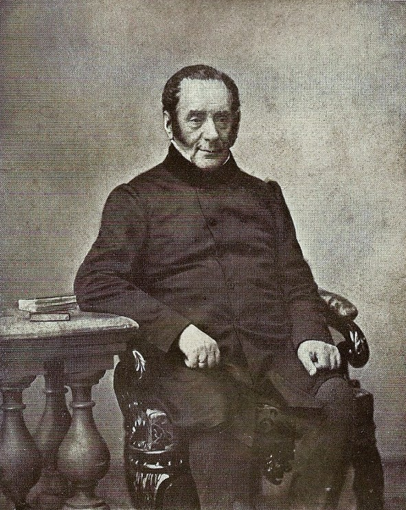 Гавриил Антонович Катакази (1794—1867)